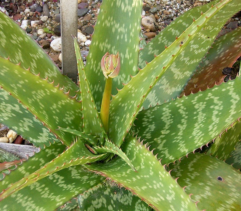 Aloe broomii